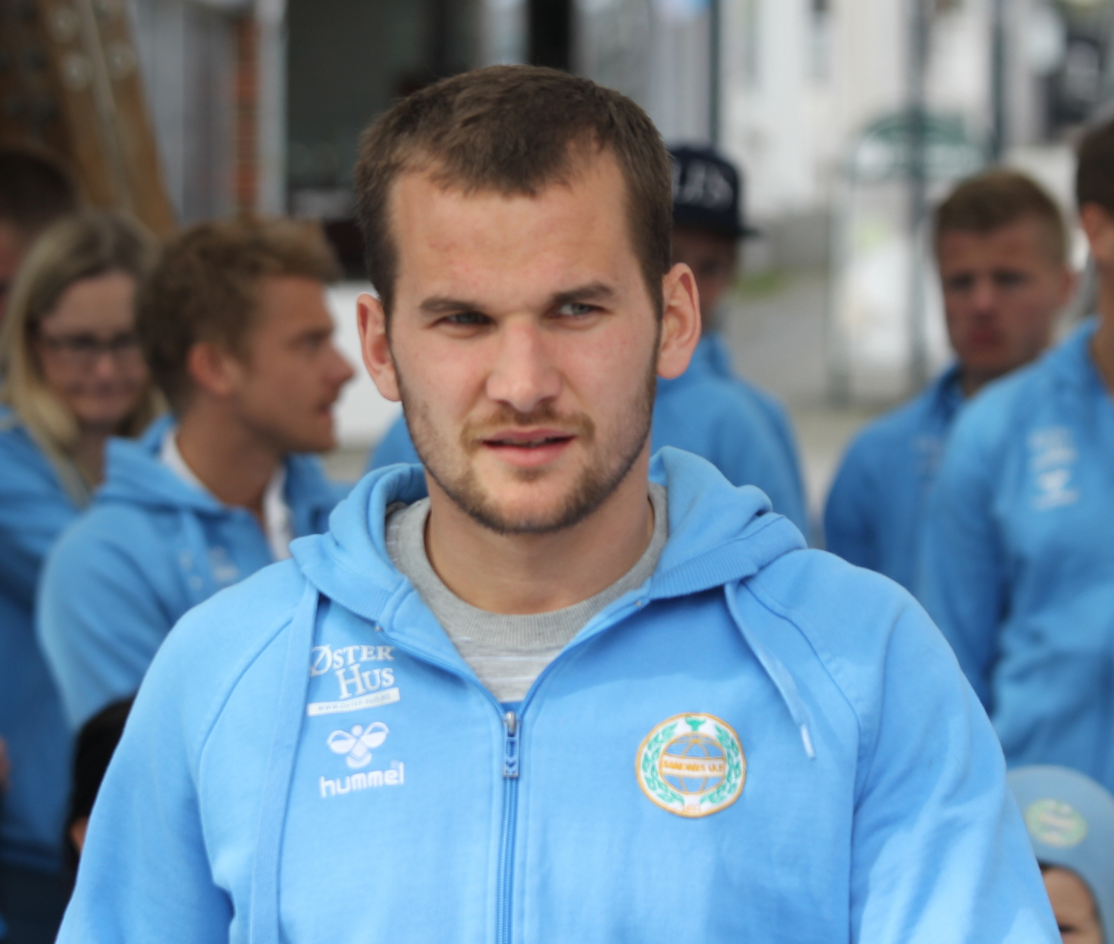 Aksel Berget Skjølsvik foran 2014 sesongen for Sandnes Ulf